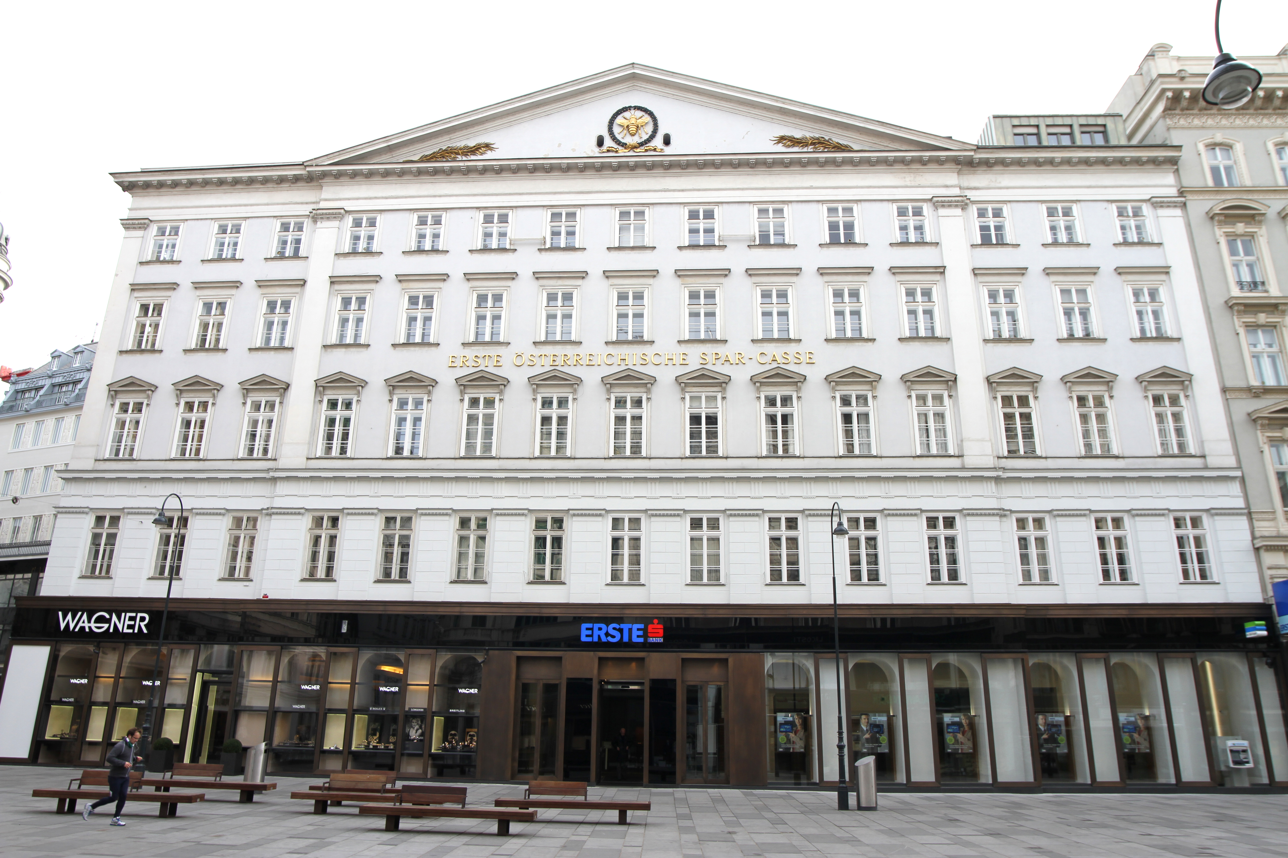 Erste Österreichische Sparkasse, Hauptgebäude